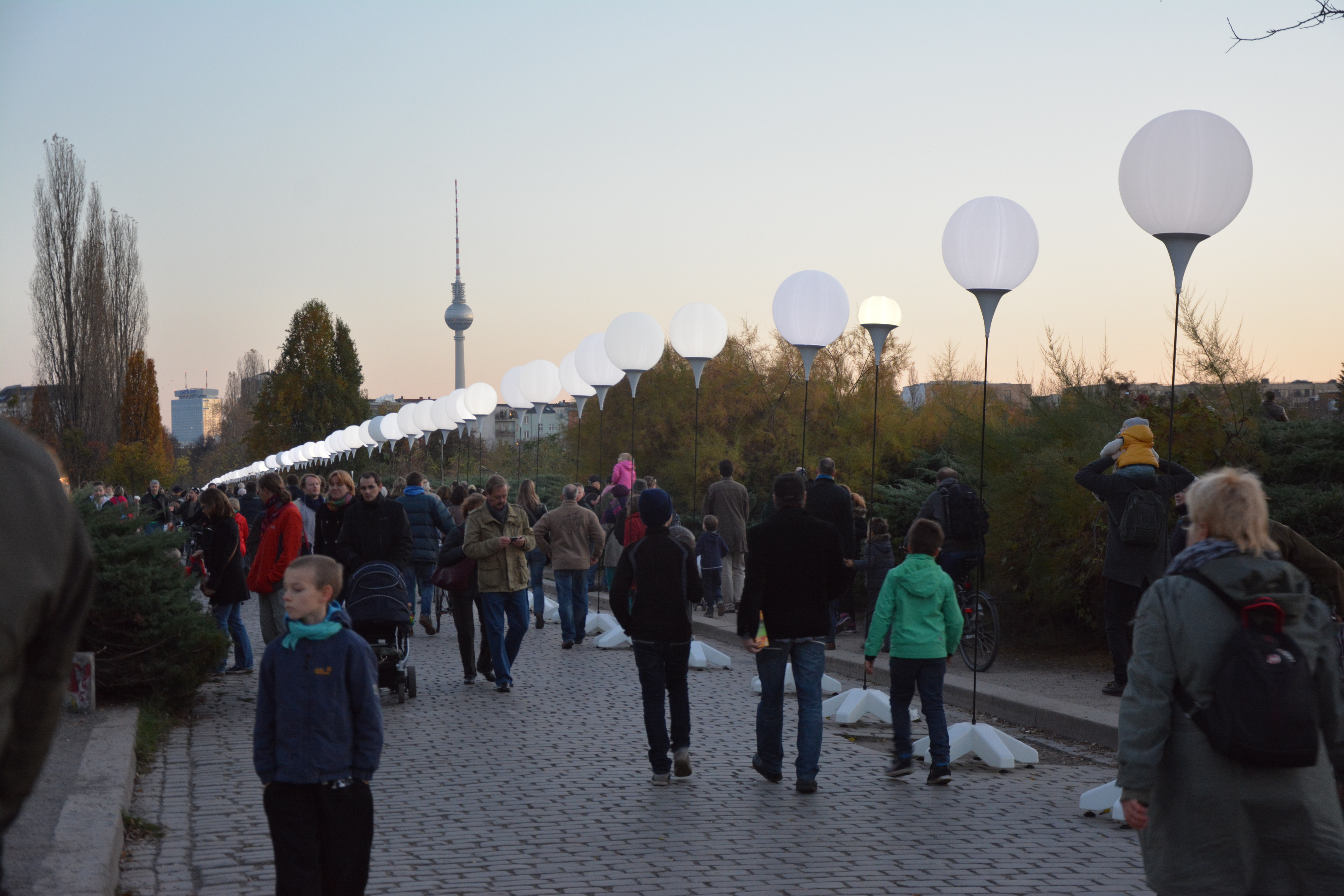 Lichtgrenze: Lichtinstallation mit rund 7000 weißen, leuchtenden Ballons zum Gedenken an den 25. Jahrestag des Falls der Berliner Mauer im vom 7. bis 9. November 2014